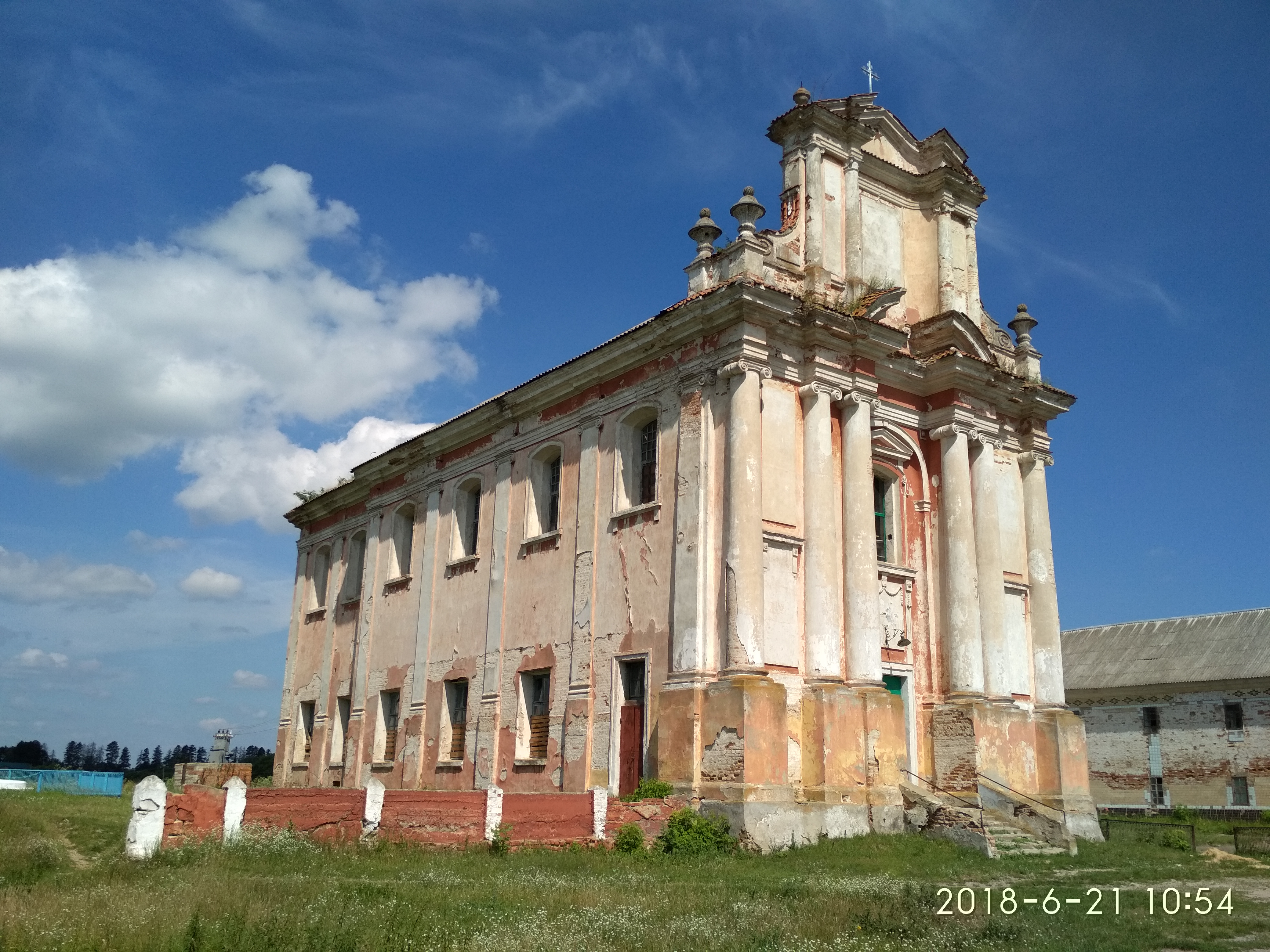 Монастир бернардинів — Костьол Діви Марії, Іванів, вул. Гагаріна